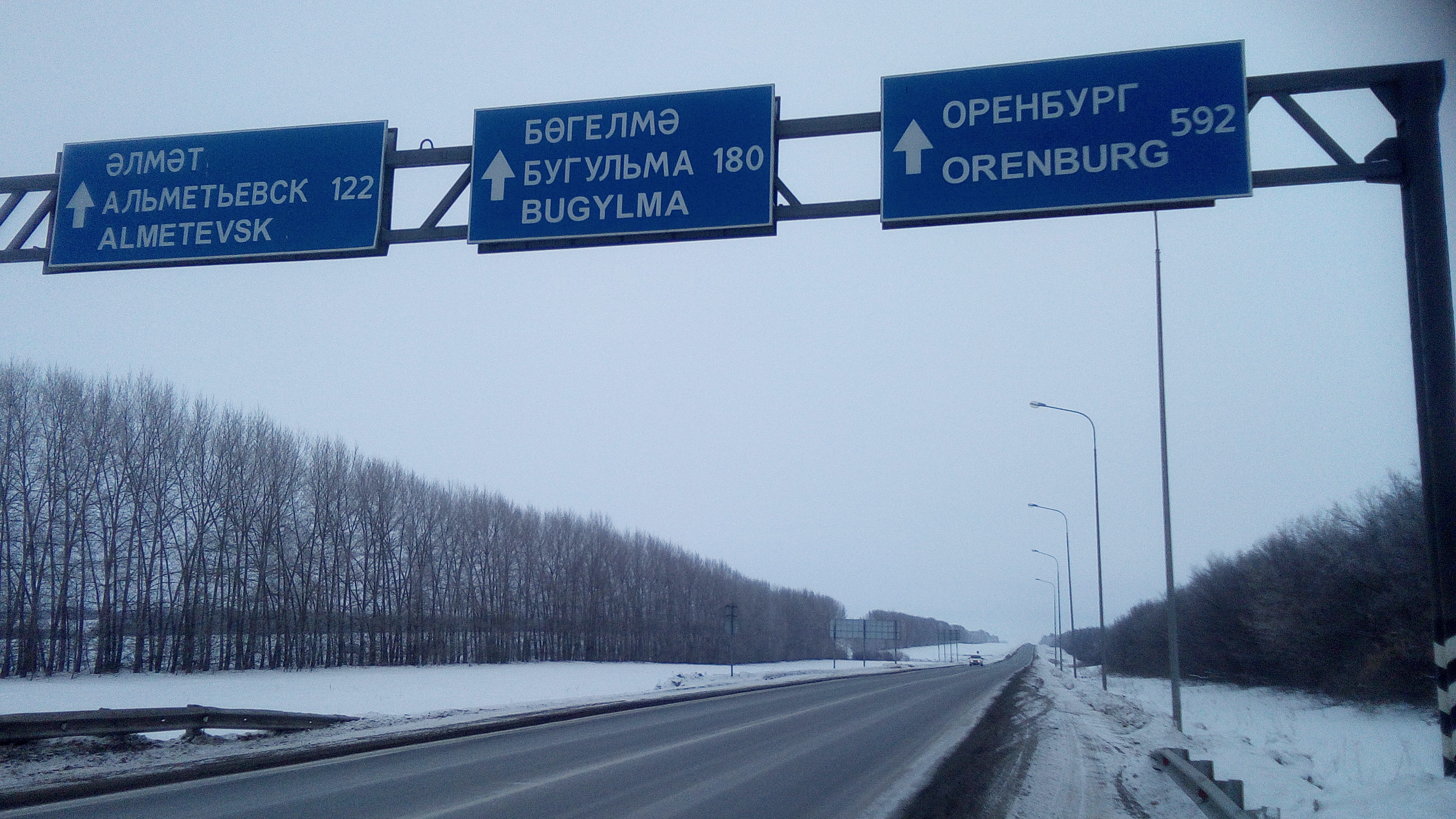 Указатель растояний на Автодороге Р239